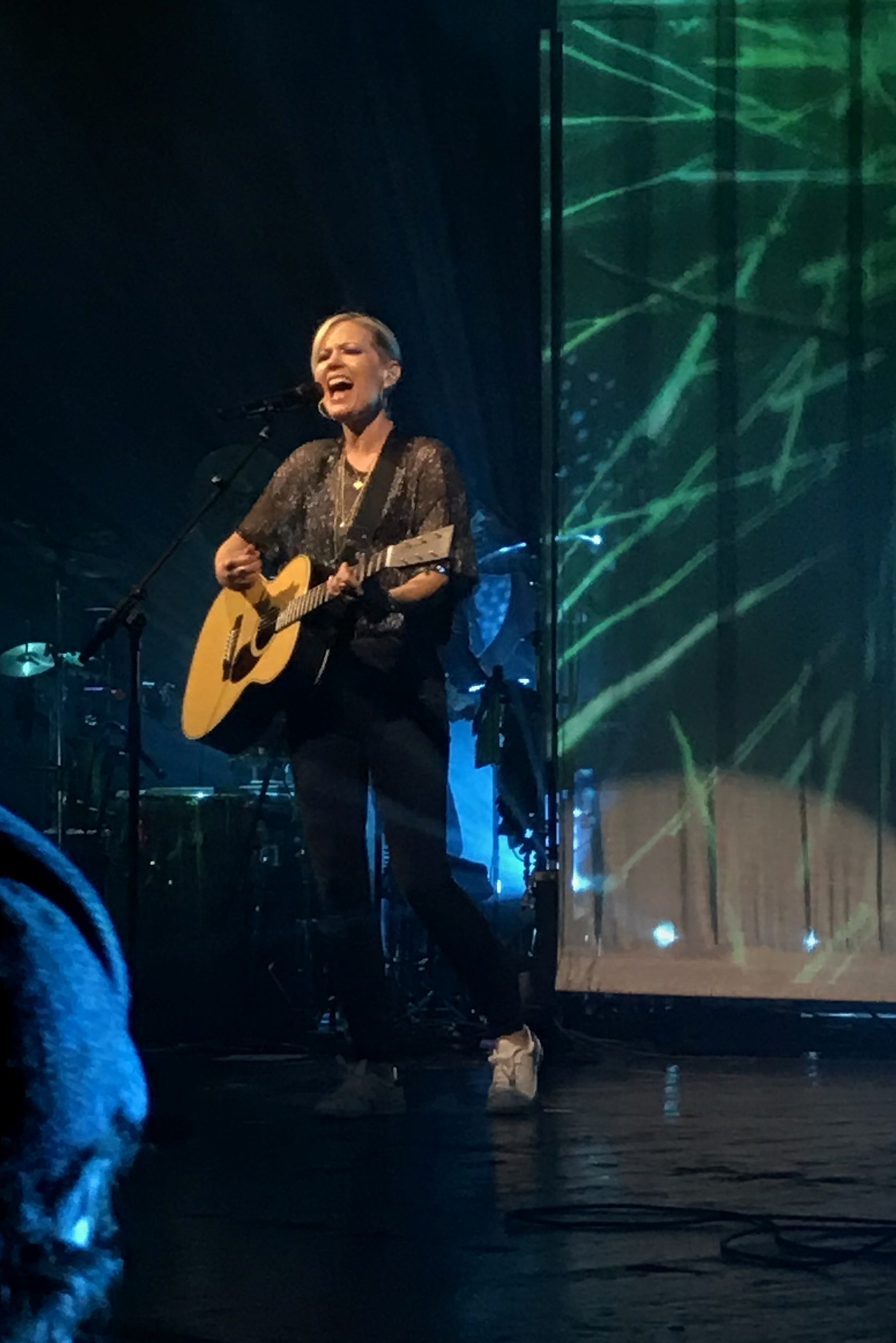 Dido während der Still-on-My-Mind-Tour in Zürich